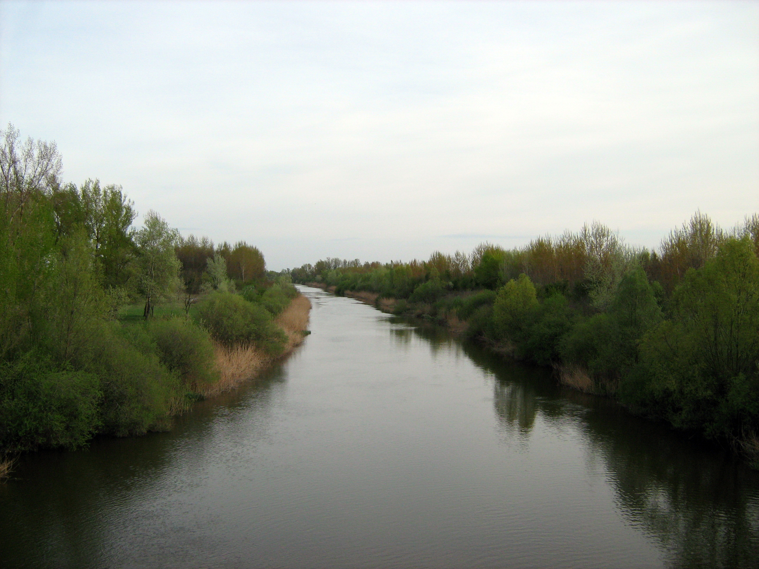 Канал Дунав-Тиса-Дунав код Купусине.